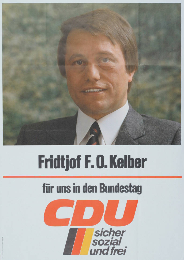 Fridtjof F.O. Kelber für uns in den Bundestag CDU sicher sozial und freiAbbildung:PorträtfotoPlakatart:Kandidaten-/Personenplakat mit PorträtAuftraggeber:CDU-Bundesgeschäftsstelle, Abt. Öffentlichkeitsarbeit, BonnObjekt-Signatur:10-001: 2397Bestand:Plakate zu Bundestagswahlen (10-001)GliederungBestand10-18:Plakate zu Bundestagswahlen (10-001) » Die 9. Bundestagswahl am 5. Oktober 1980 » CDU » Mit PorträtfotoLizenz:KAS/ACDP 10-001: 2397 CC-BY-SA 3.0 DE